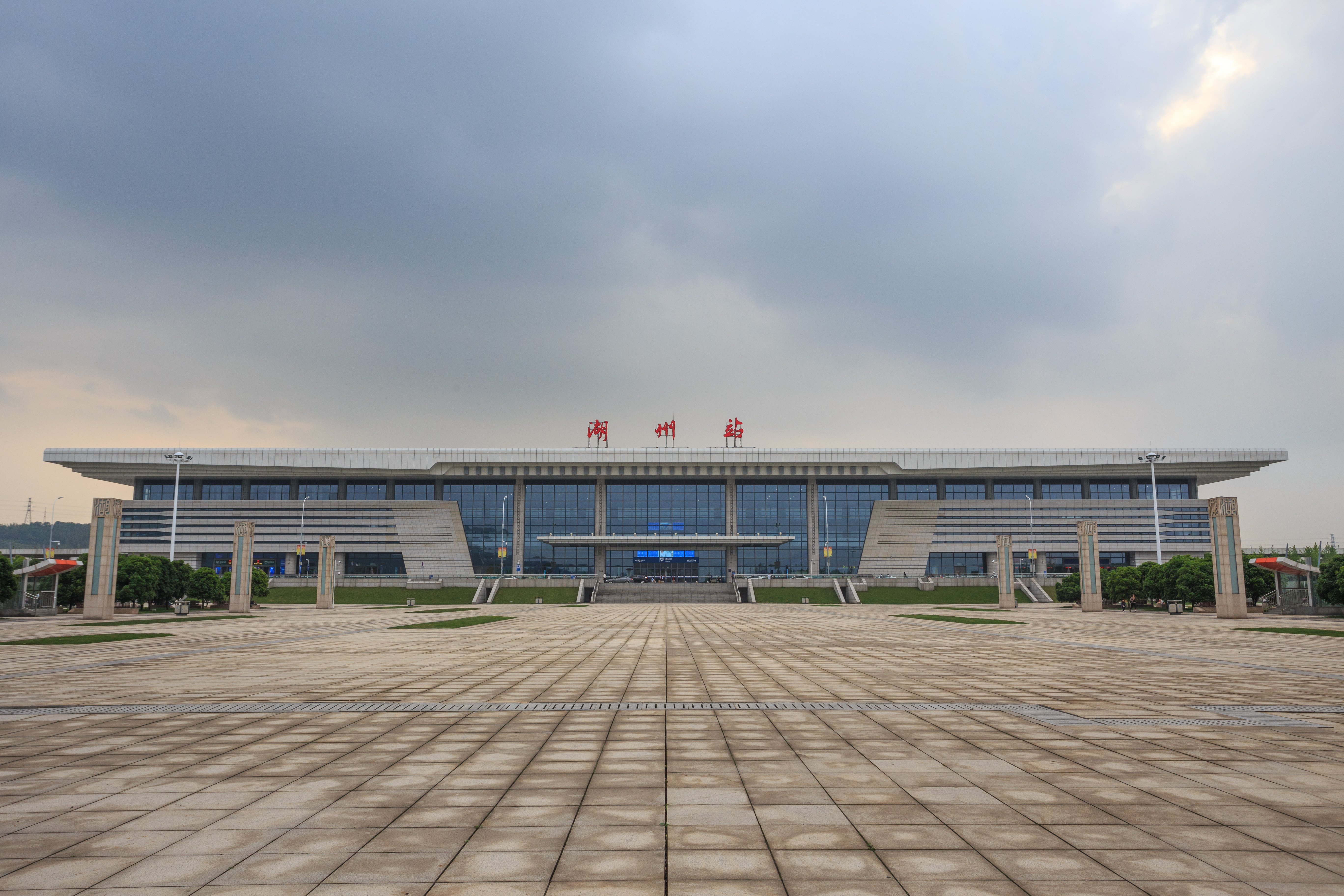 湖州火车站